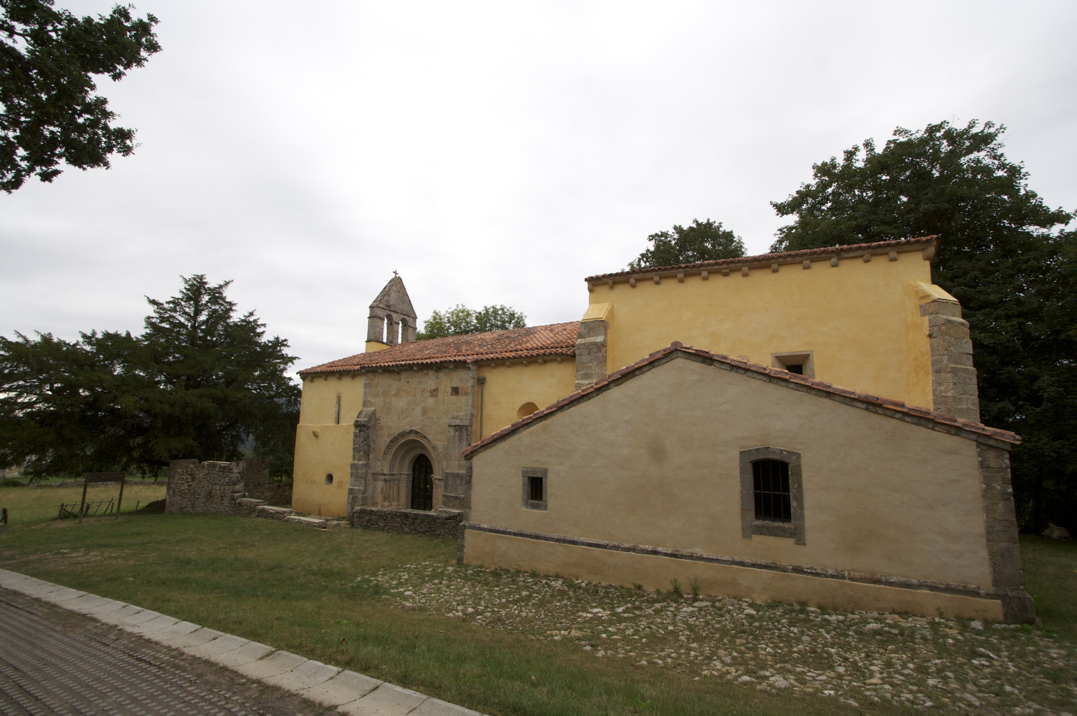 Iglesia de Santa Eulalia de Abamia, concejo de Cangas de Onís, Asturias.